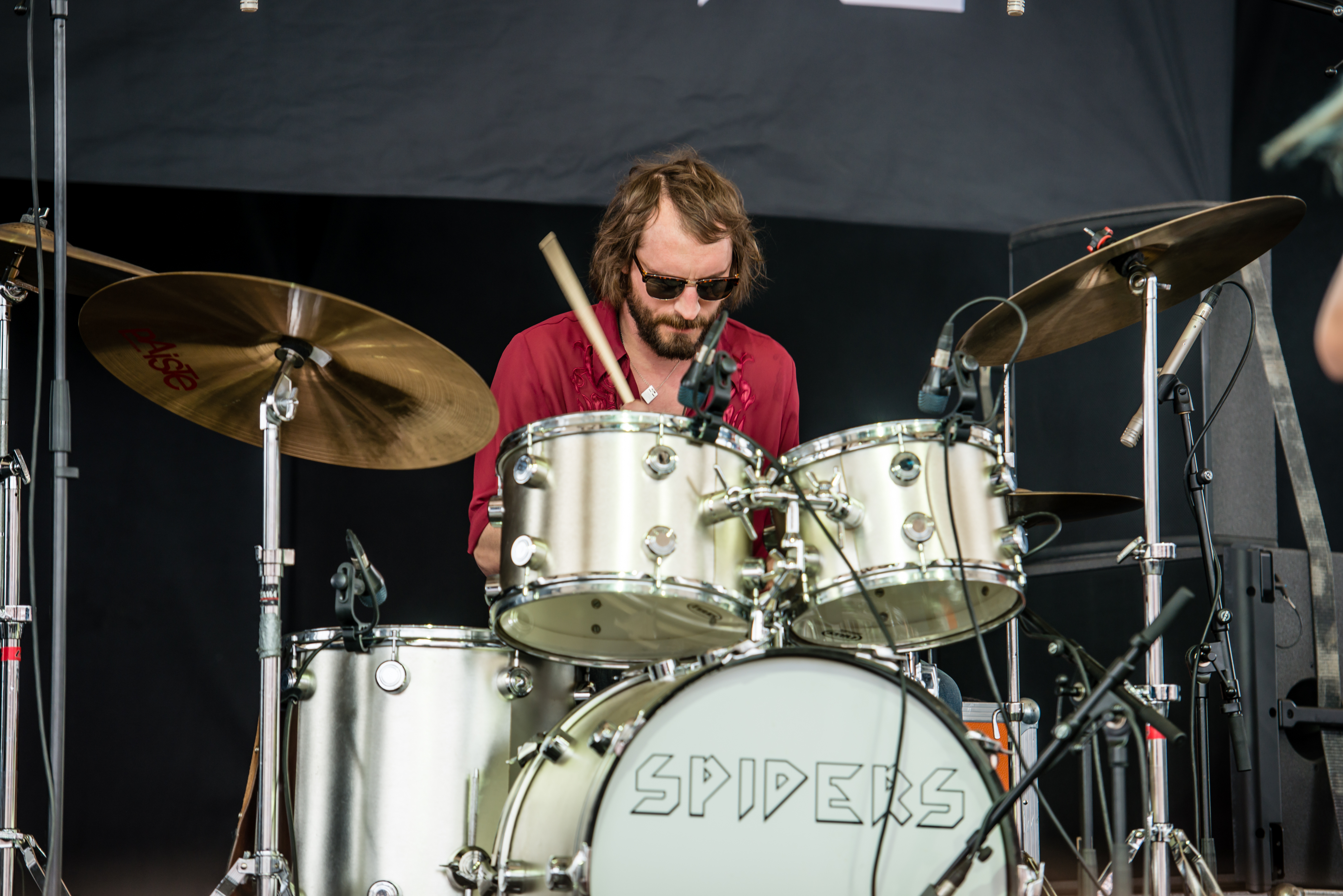 'Rock Hard Festival 2015; Gelsenkirchen Amphitheater': 'Spiders'